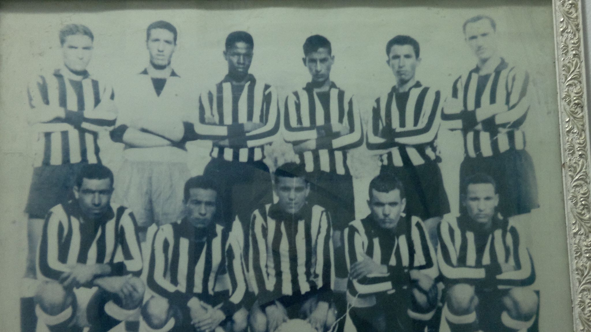 صورة الفريق الأول لنادي المستقبل بالجميل